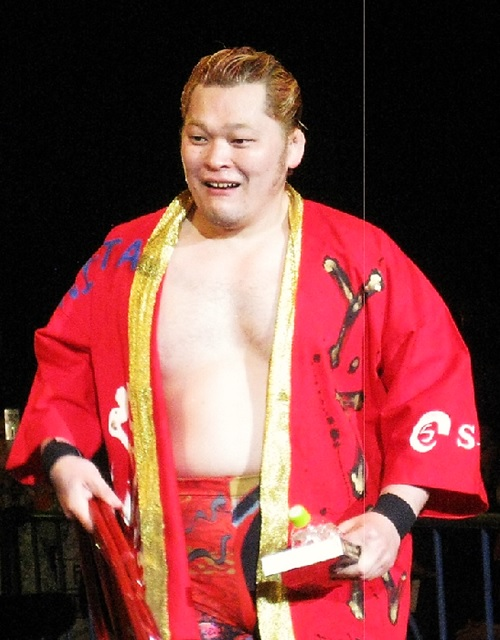 2015年3月22日 ベイコム総合体育館「Road to INVASION ATTACK 2015」矢野通